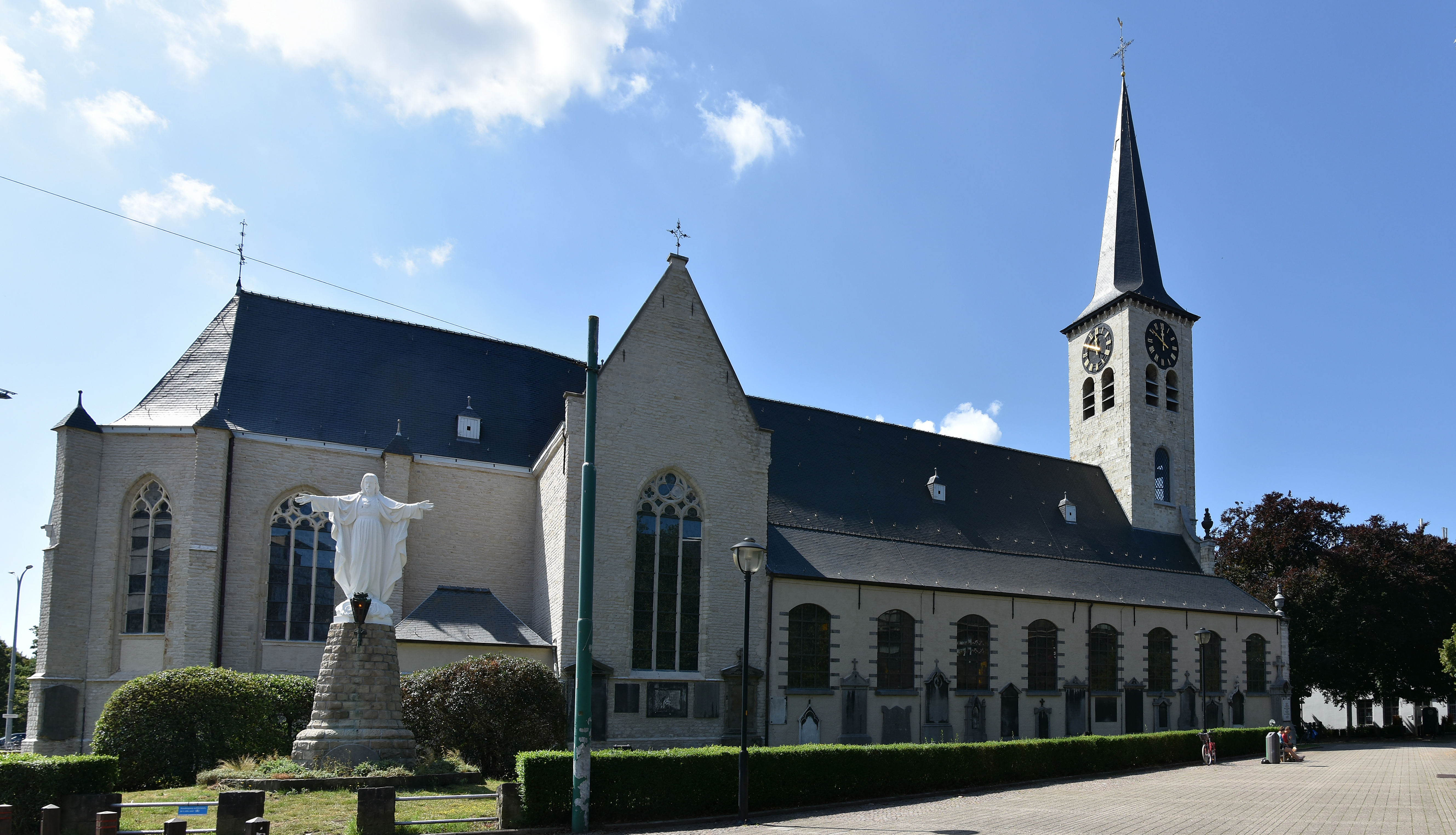 Sint-Willibrorduskerk (Berchem) (10944) 29-07-2019 11-50-10 This photo of immovable heritage has been taken in the Flemish Region